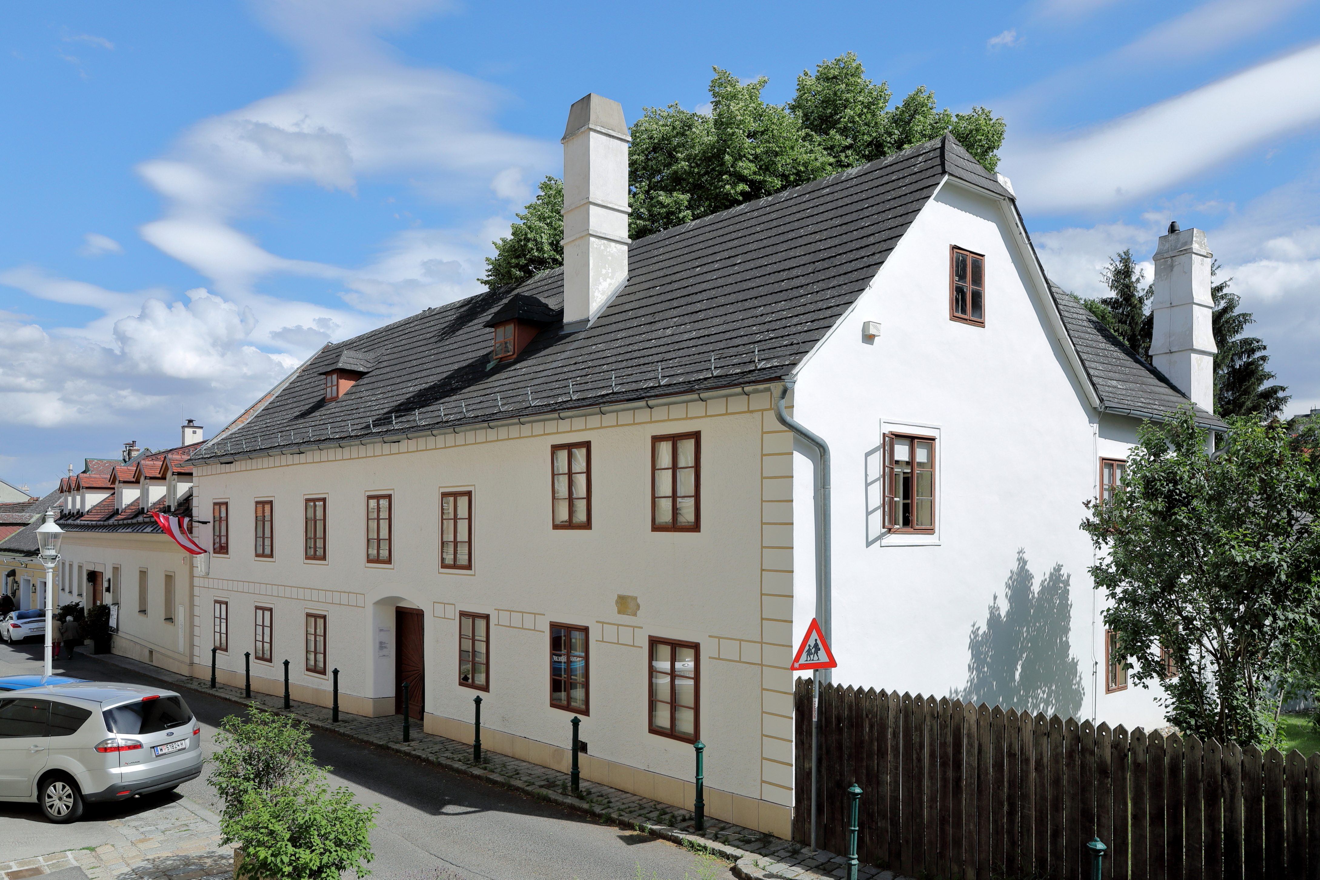 Das Haus an der Adresse Probusgasse 6 in Heiligenstadt, ein Wiener Stadtteil im 19. Bezirk Döbling, in dem Ludwig van Beethoven das sogenannte Heiligenstädter Testament verfasste. Das Haus wurde 1967 von der Stadt Wien angekauft, die darin eine Gedenkstätte einrichtete. 2017 wurde das Haus renoviert und von einer 40 m² umfassenden Gedenkstätte zu einem 265 m² großen Beethoven-Museum erweitert, das von Museen der Stadt Wien betrieben wird.